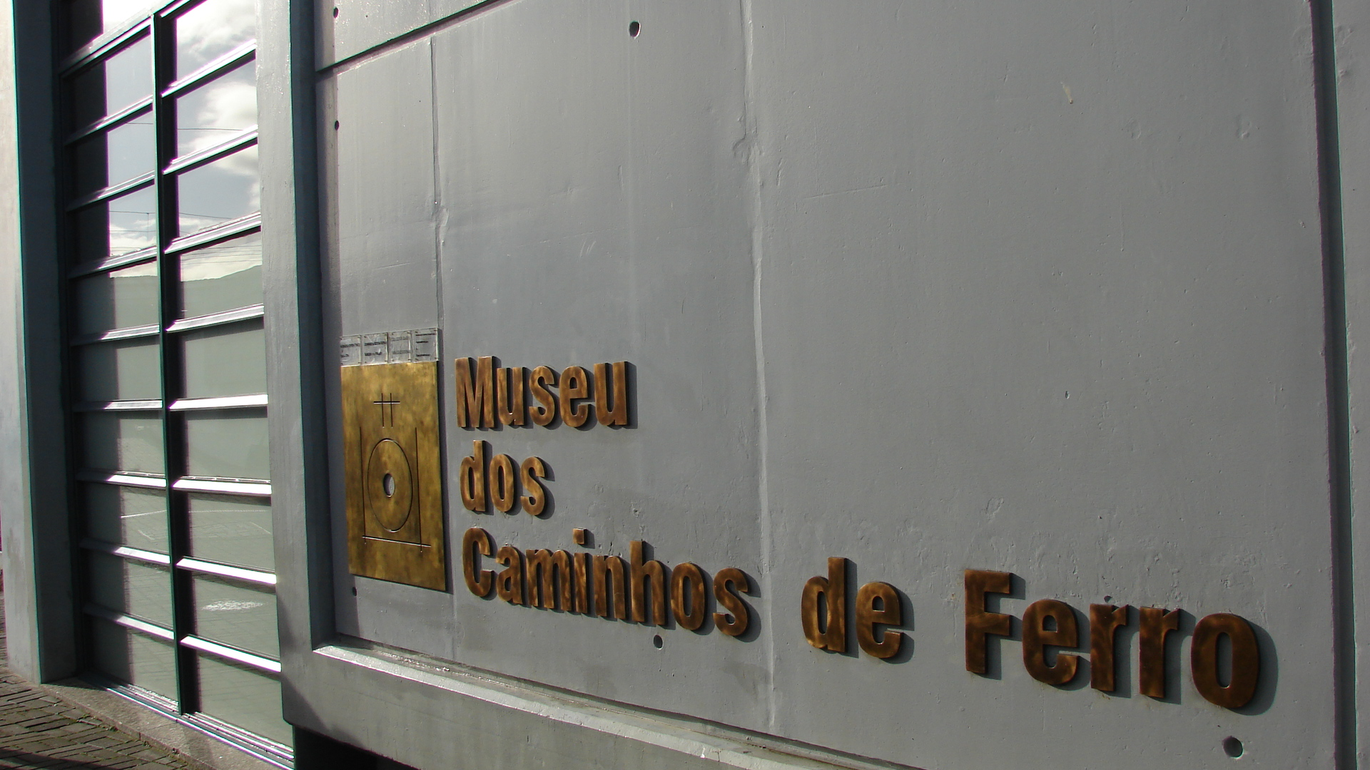 Entrada do Museu dos Caminhos de Ferro em Lousado (Vila Nova de Famalicão)